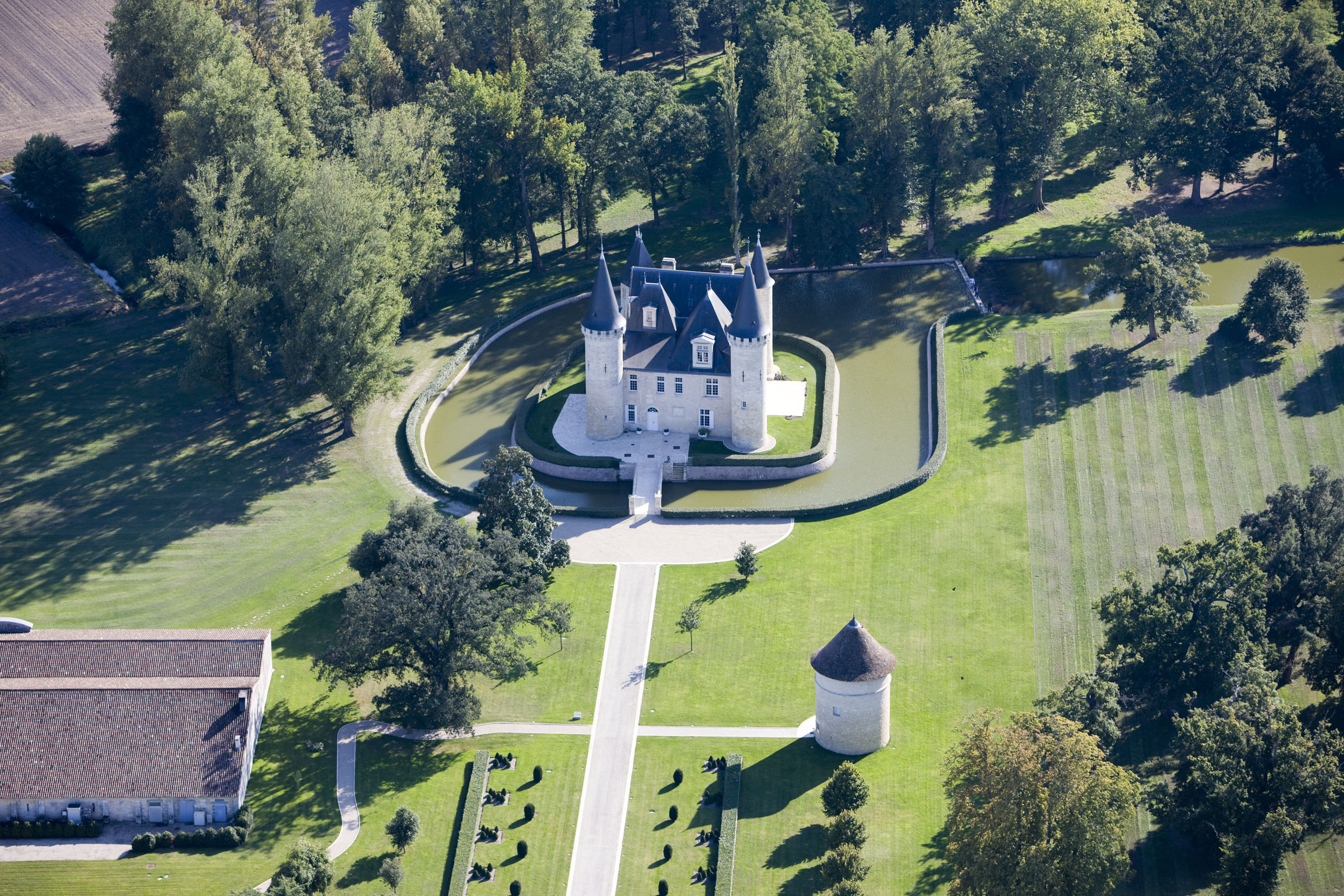 Vue Aérienne du Château D'Agassac, du Pigeonnier et des Chais